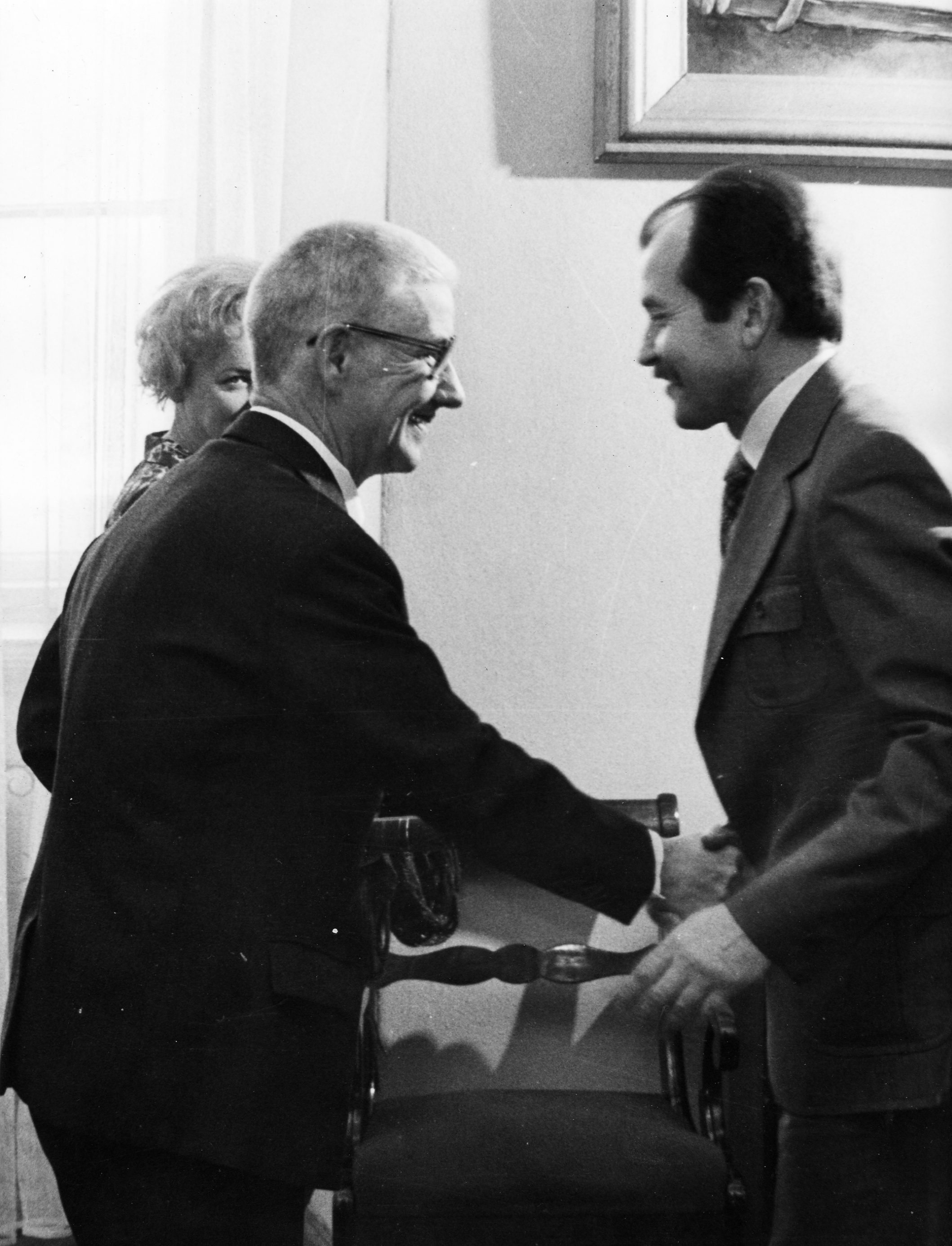 Jedno z ostatnich zdjęć prof.Zielińskiego (z lewej): przyjmuje gratulacje od A.Juzwenki podczas spotkania w Auli Leopoldina Uniwersytetu Wrocławskiego 27 lutego 1981